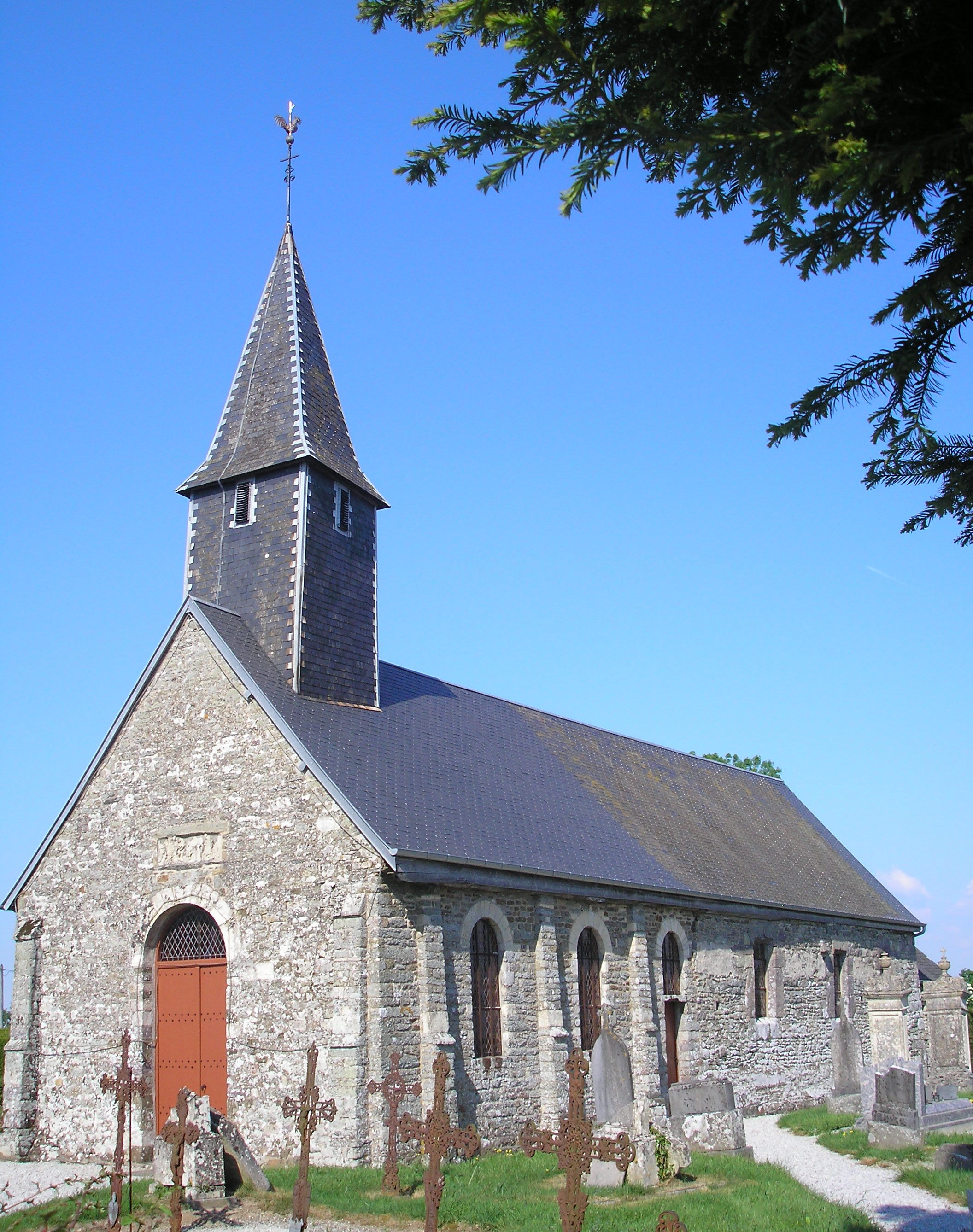 Périgny (Normandie, France). L'église Saint-Julien.